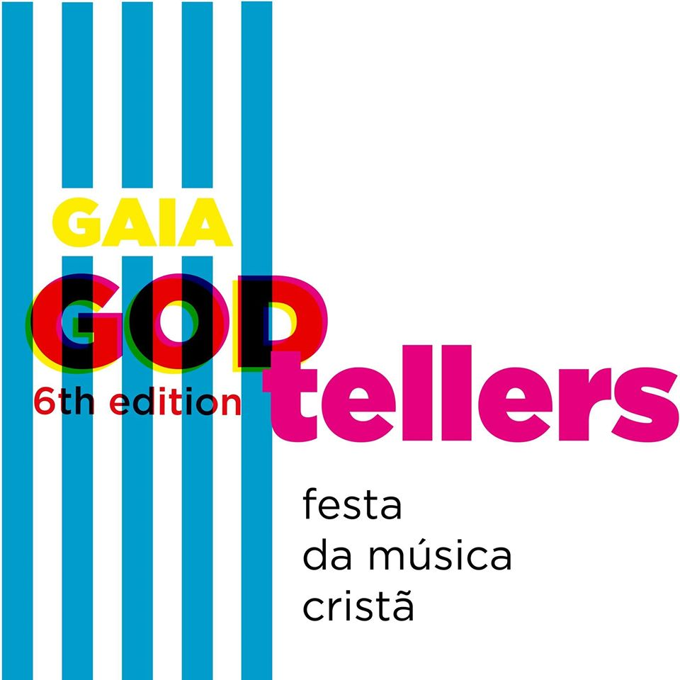 Imagem oficial do Gaia GodTellers